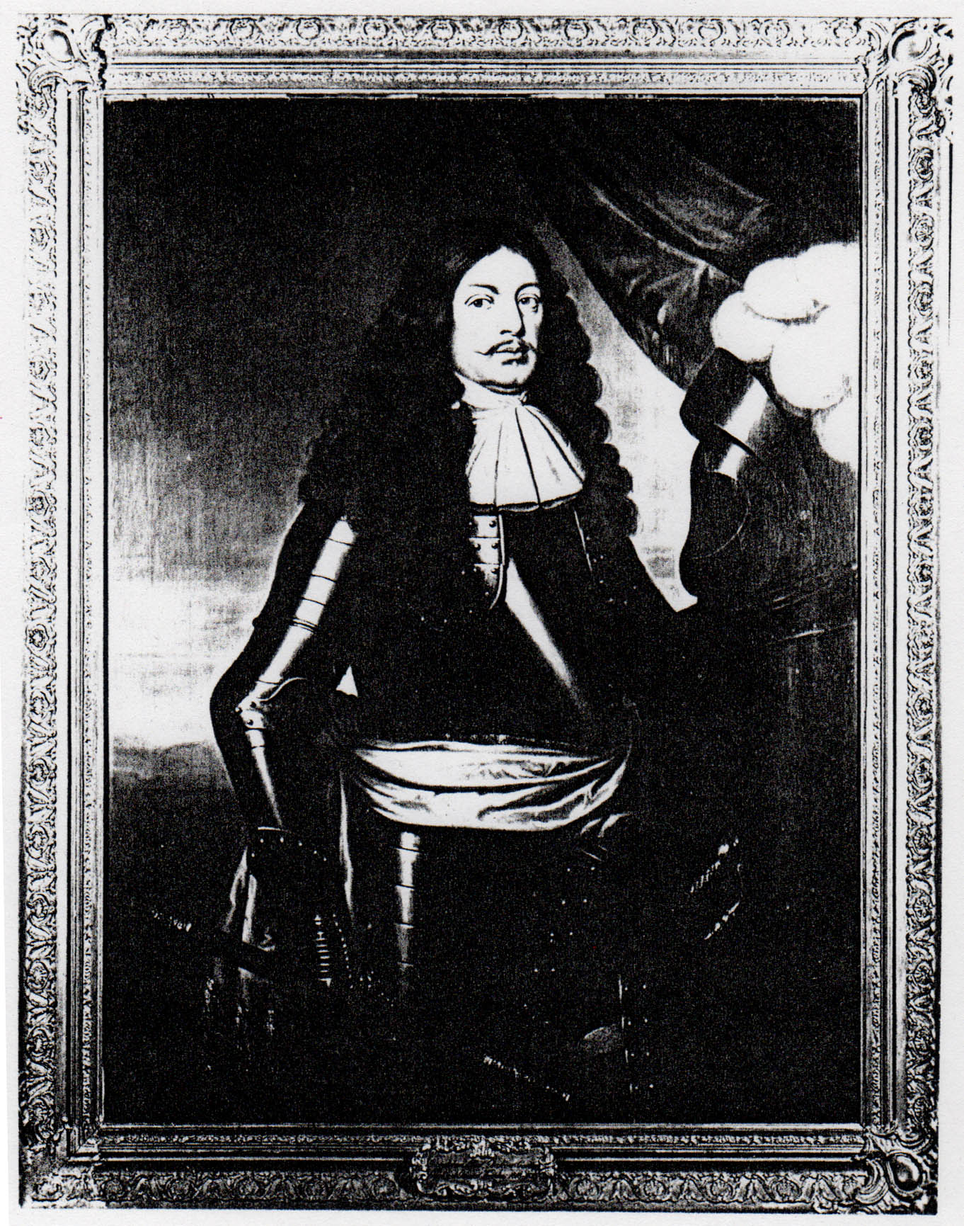 Georg Adam von Pfuhl (Pfuel) (* 1618; † 1672), Herr auf Gross- und Klein-Buckow (Märkische Schweiz), war ein königlich-preußischer General der Kavallerie, sowie Gouverneur der Zitadelle Spandau.